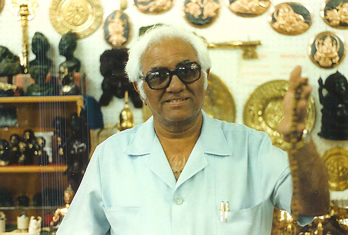 Durban: Indesche Geschäftsmann.